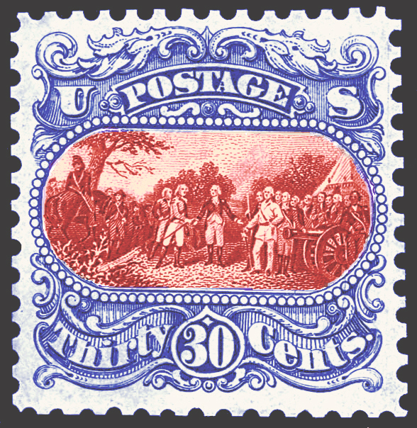 1869 30c essay